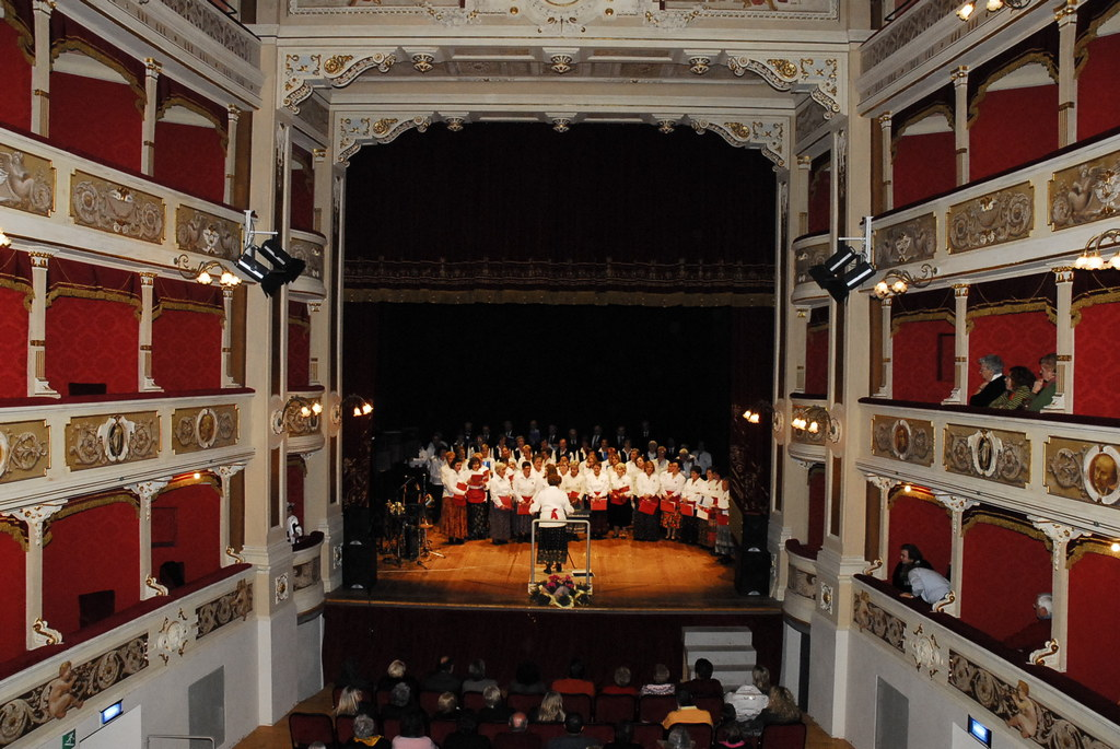 Interno del Teatro Verdi